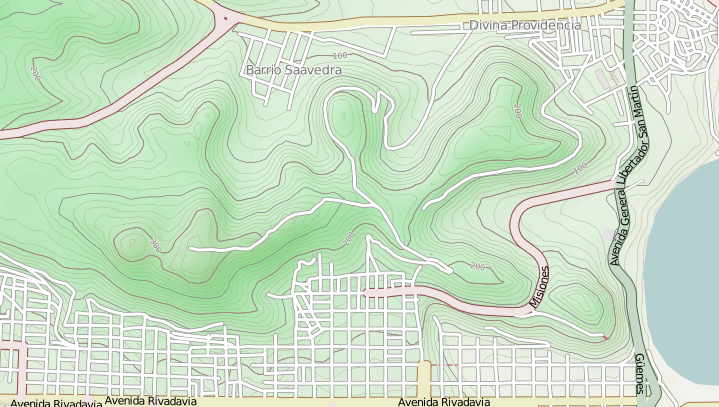 Vista del Cerro Chenque y sus alrededores en "modo" Cycle Map